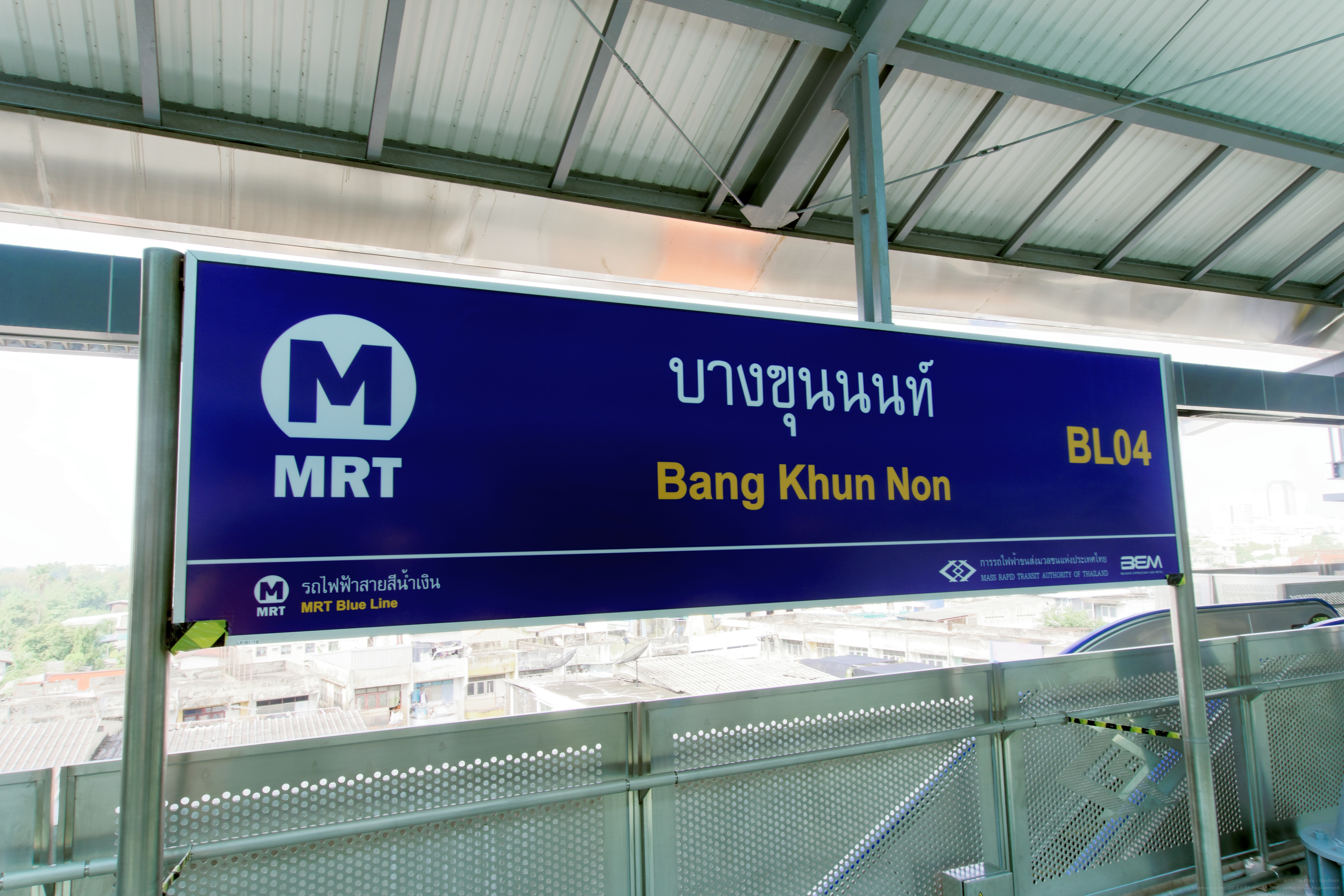 MRT Bang Khun Non – Traditional sign